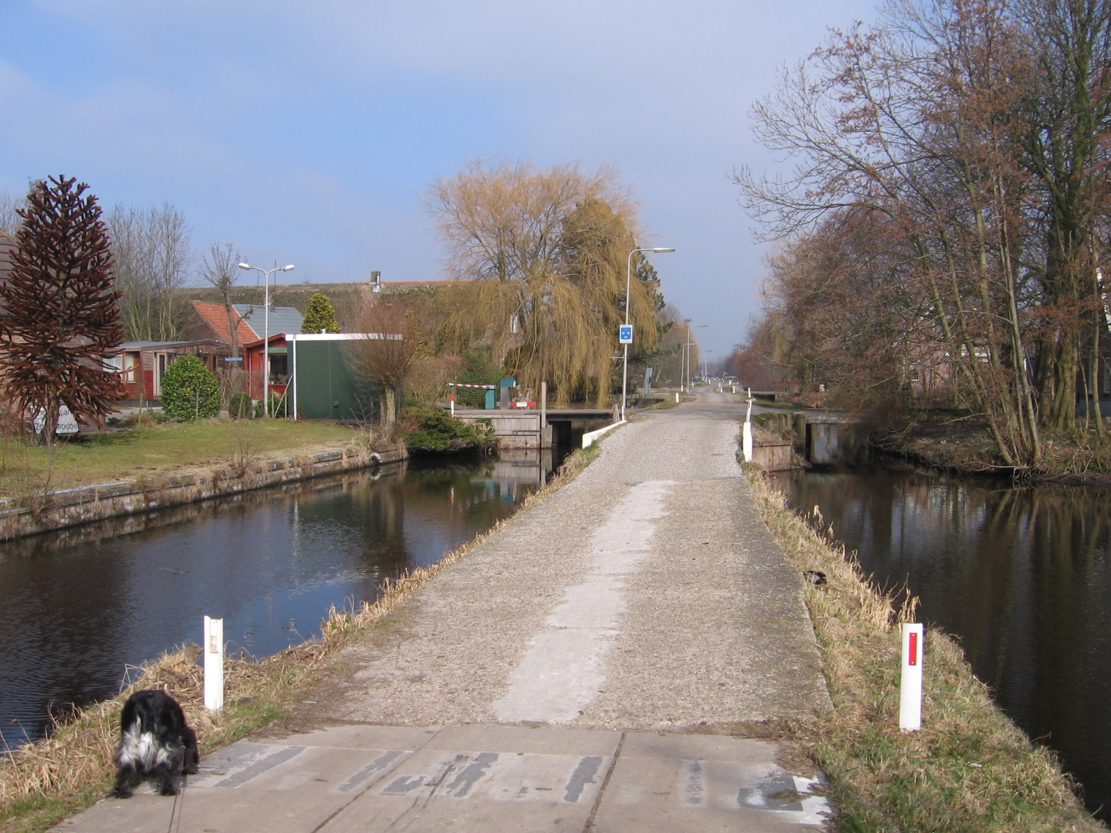 Zoeterwoude and surroundings